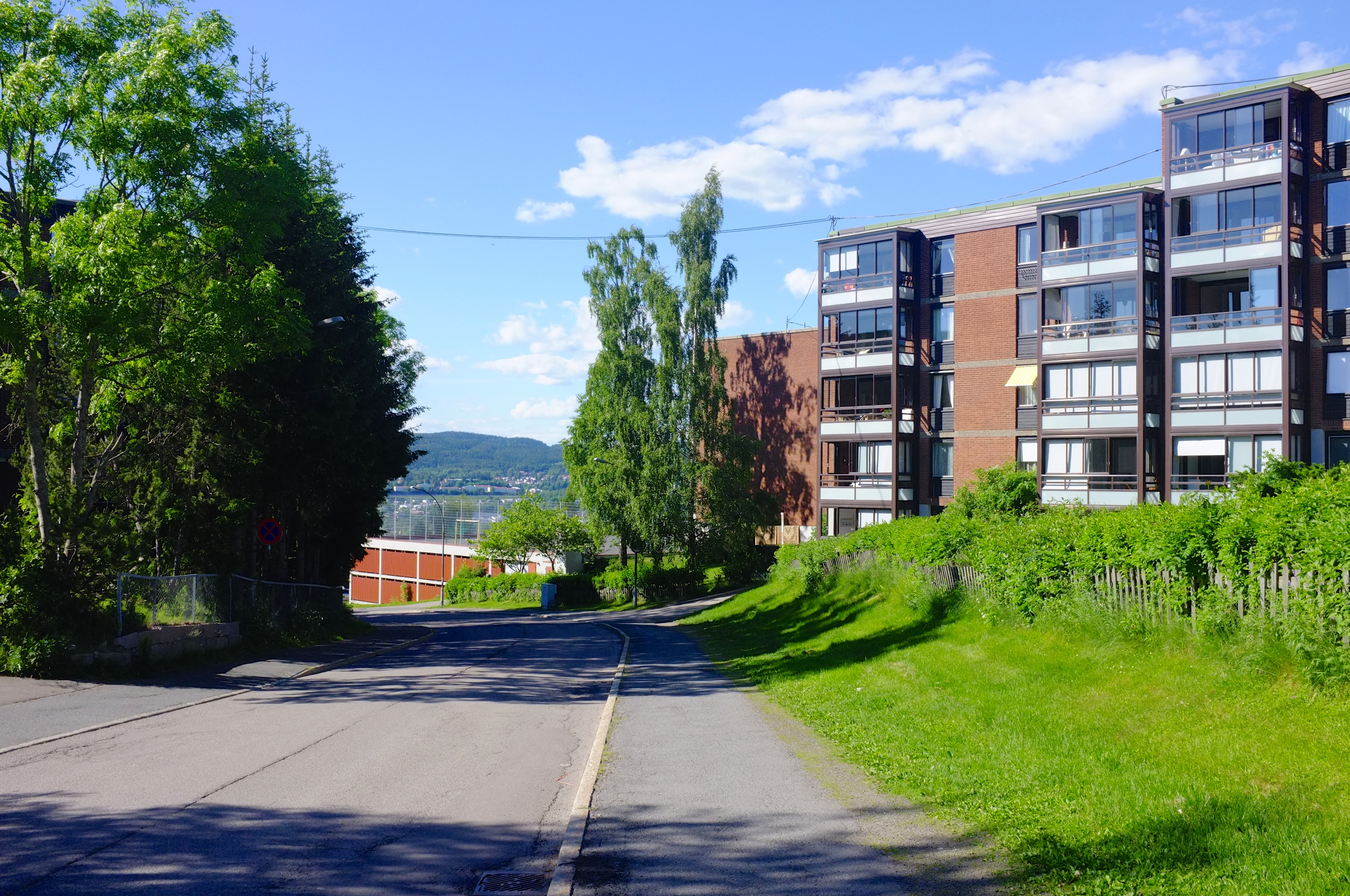 Lutvannsveien i Oslo.